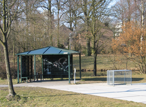 Eigen foto van door gemeente aangelegde hangplek met trapveld in de wijk Zwanenveld (Dukenburg) van Nijmegen. Foto gemaakt op 23-03-2006